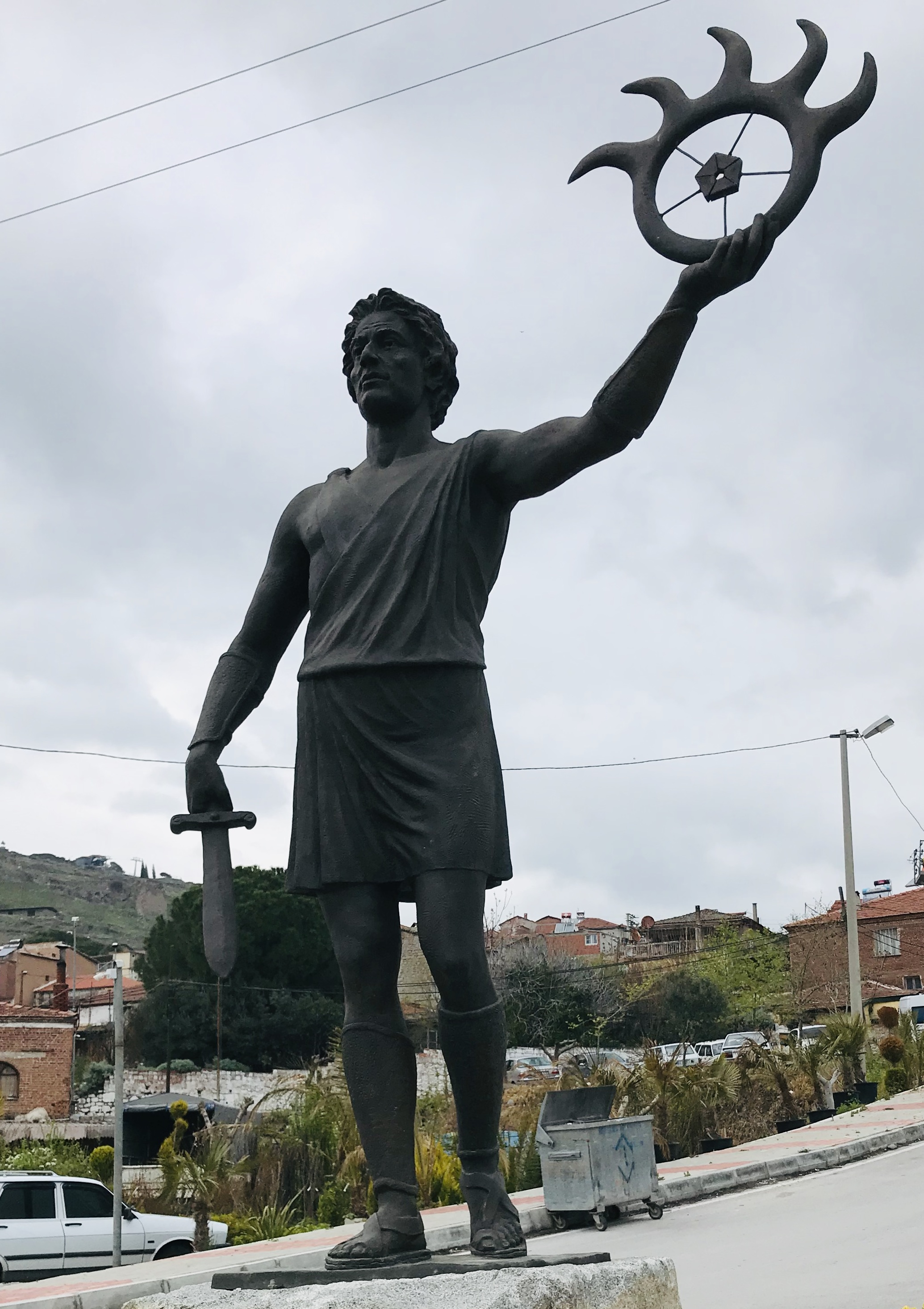 Pergamon Kralı Aristonikos (III. Eumenes)’in bir heykeli, Bergama, İzmir, Türkiye.